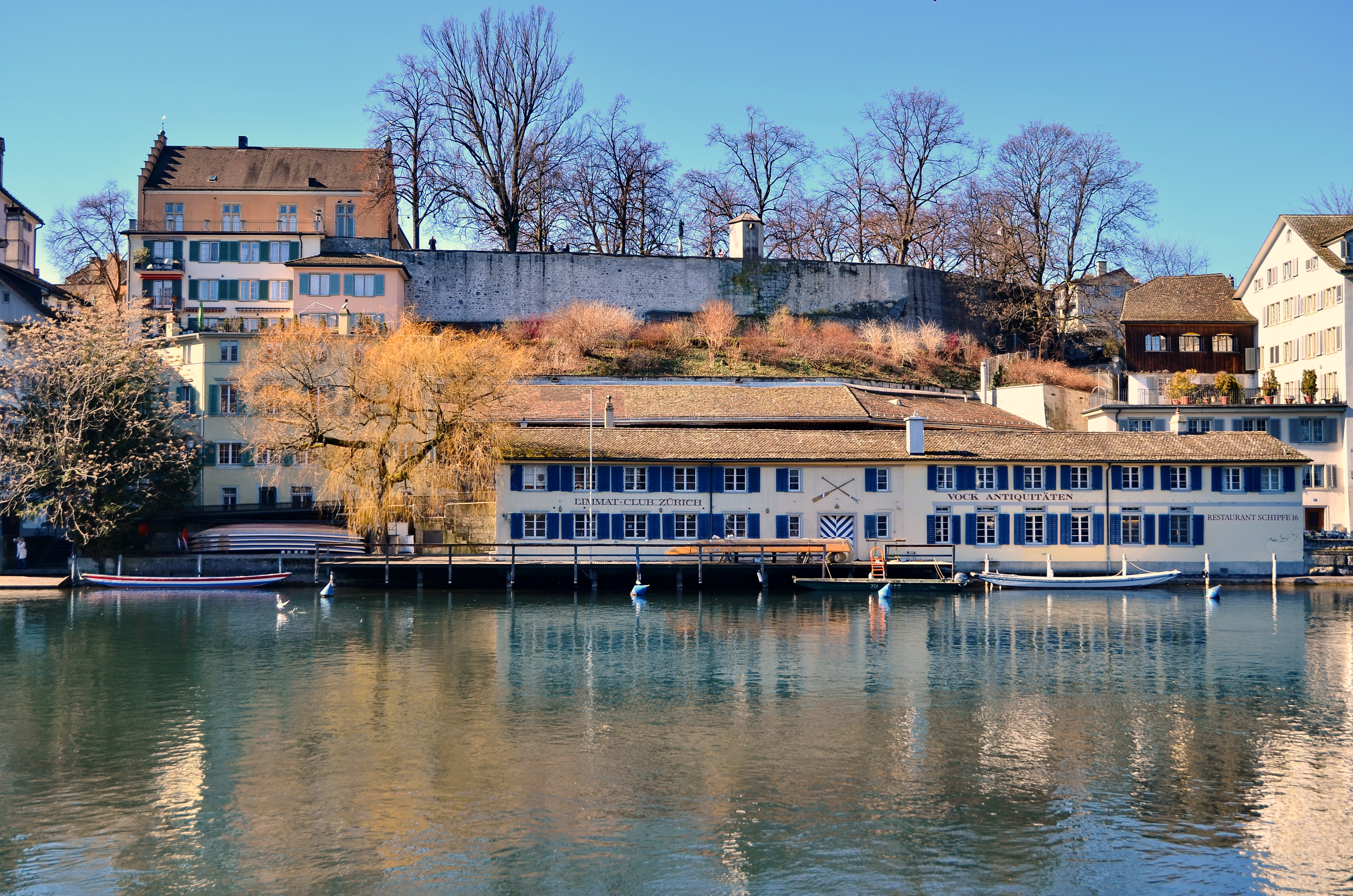 Schipfe and Lindenhof hill as seen from Rathausbrücke (Gmüesbrugg) in Zürich (Switzerland)